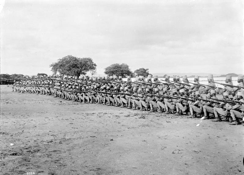 Schutztruppe